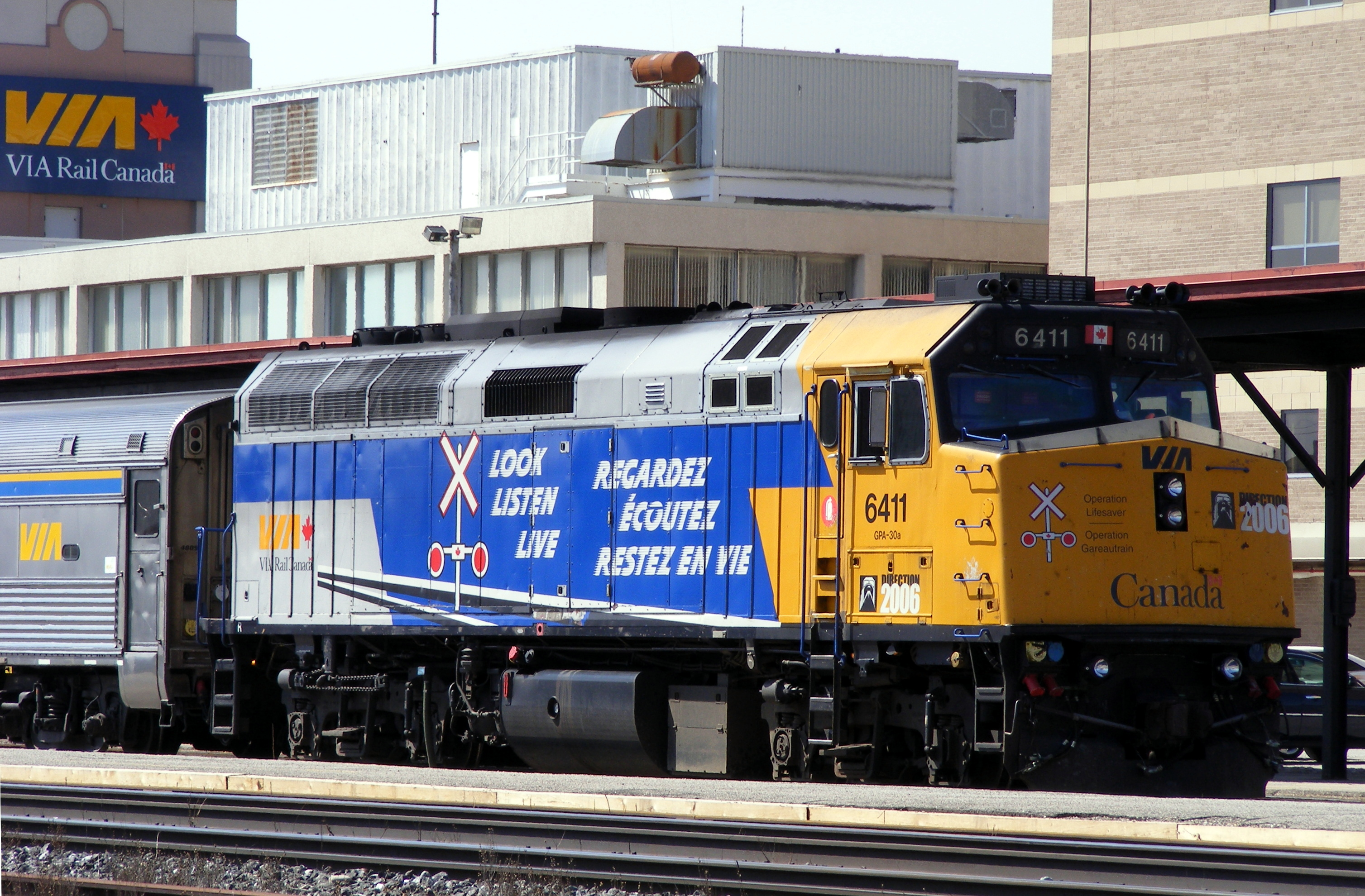 Via Rail diesel locomotive 6411 at London, Ontario station.